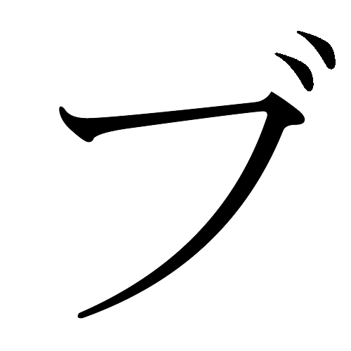 Japanese Katakana "Bu"